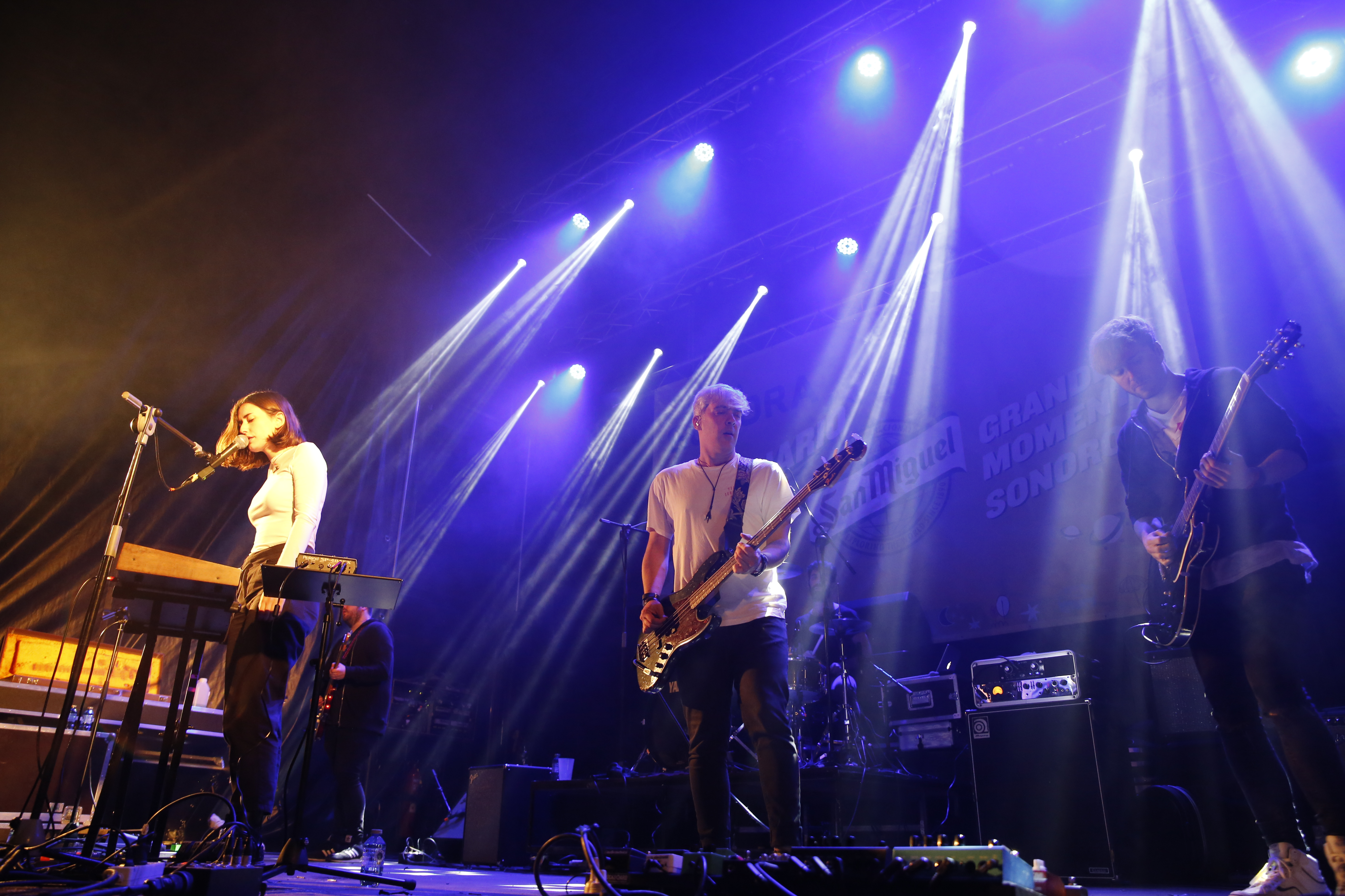 El grupo Rural Zombies en el festival Palencia Sonora 2018.